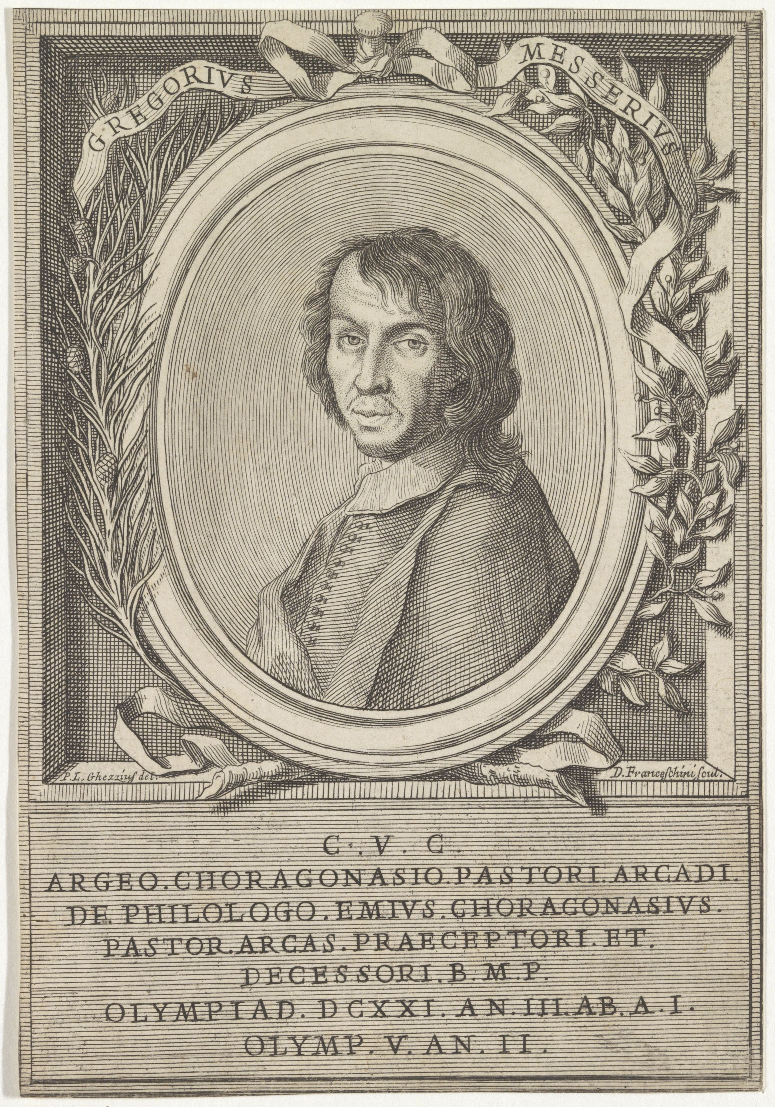 IdentificatieTitel(s): Portret van Gregorio MessereObjecttype: prent Objectnummer: RP-P-1909-4923Opschriften / Merken: verzamelaarsmerk, verso, gestempeld: Lugt 2228VervaardigingVervaardiger: prentmaker: Domenico Franceschini (vermeld op object)naar tekening van: Pier Leone Ghezzi (vermeld op object)Plaats vervaardiging: ItaliëDatering: ca. 1700Fysieke kenmerken: etsMateriaal: papier Techniek: etsenAfmetingen: blad: h 175 mm (Binnen plaatrand afgesneden.) × b 120 mm (Binnen plaatrand afgesneden.)OnderwerpWat: historical personsportrait of a writerWie: Gregorio MessereVerwerving en rechtenVerwerving: aankoop 1905Copyright: Publiek domein